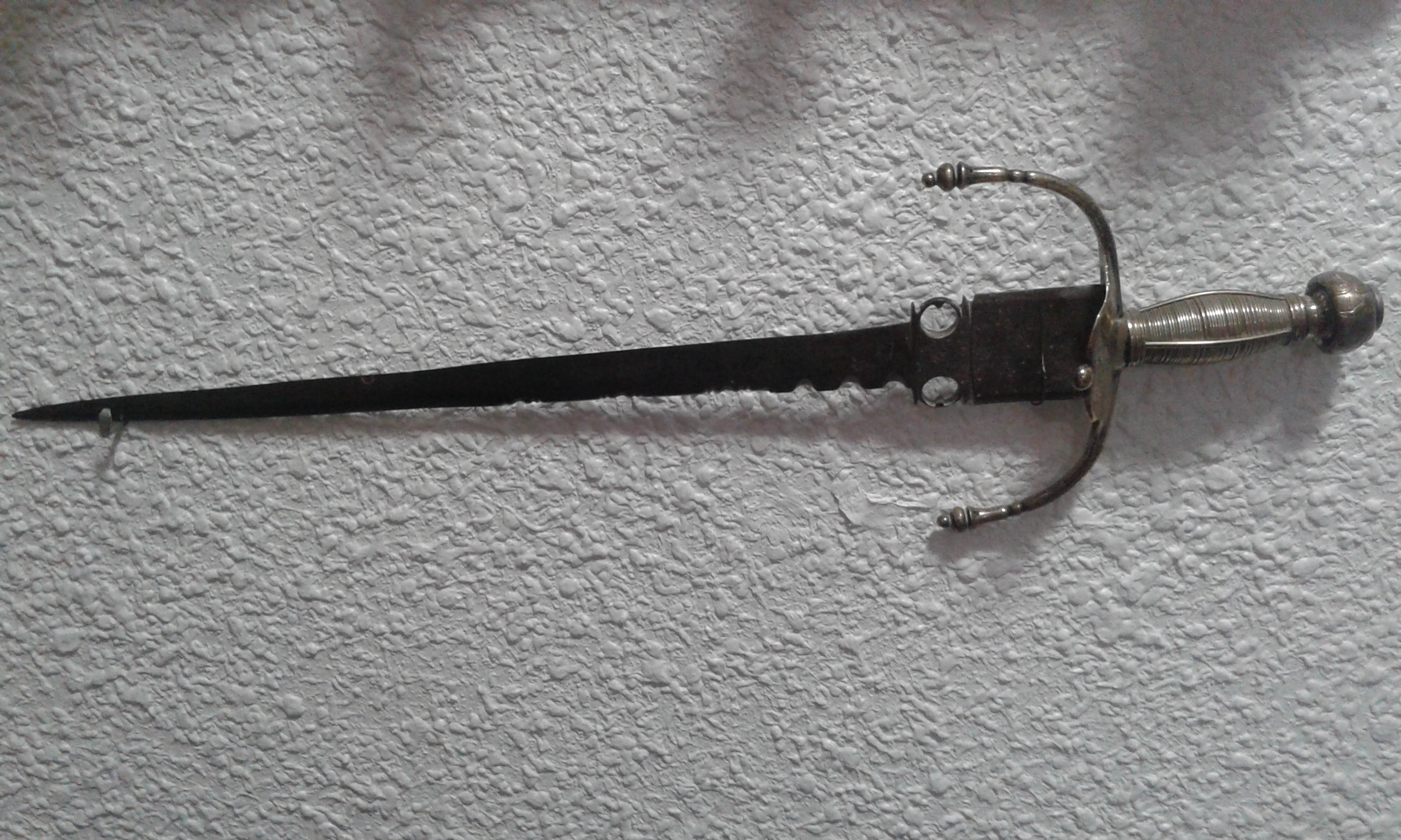 Espada española del tipo "misericordia", datada en el s.XVII, que se empleaba para asestar el golpe de gracia a los adversarios moribundos. La empuñadura muestra los blasones nobiliarios de su propietario (no visibles en la fotografía). Procedente de colección privada.